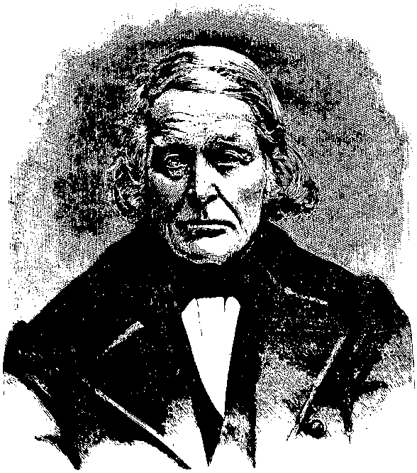 Bondepolitikeren John Neergaard.